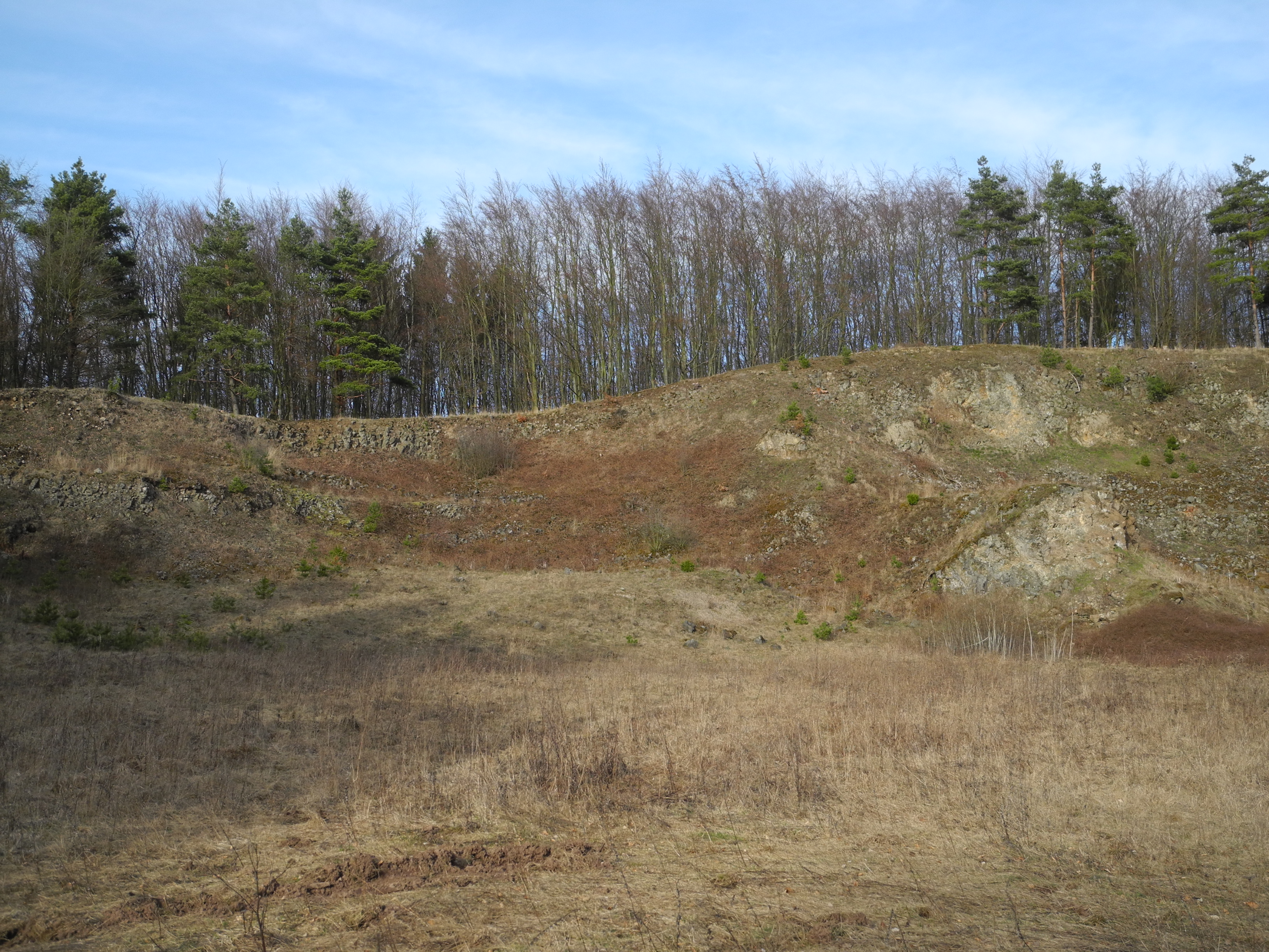 Flächenhaftes Naturdenkmal im Landkreis Kassel 6.33.887. Teilfläche ehemaliger Steinbruch „Schierenkopf“ westlich von Wolfhagen.